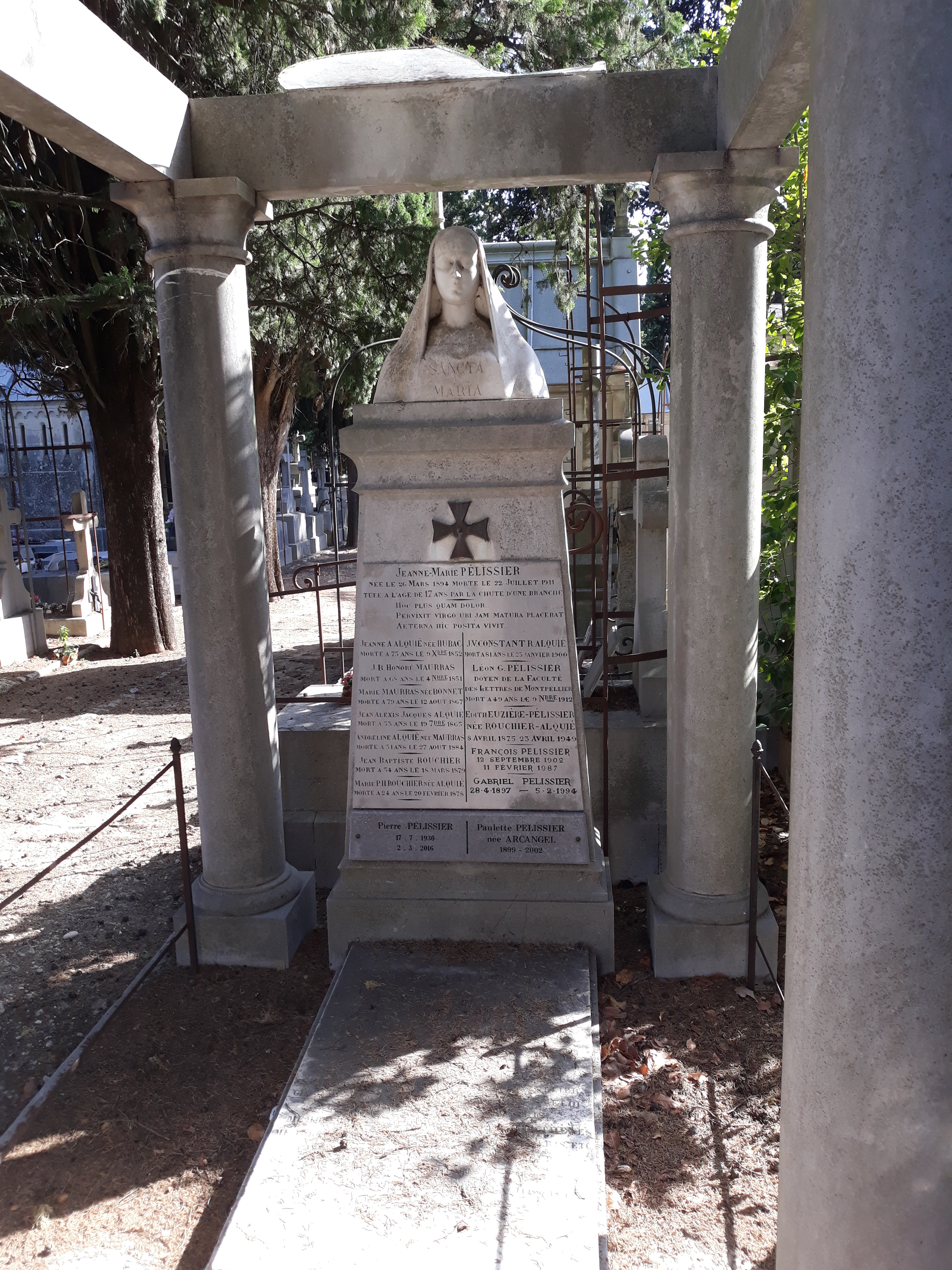 Das Grab des französischen Historikers Léon-Gabriel Pélissier auf dem Cimetière Saint-Lazare in Montpellier.